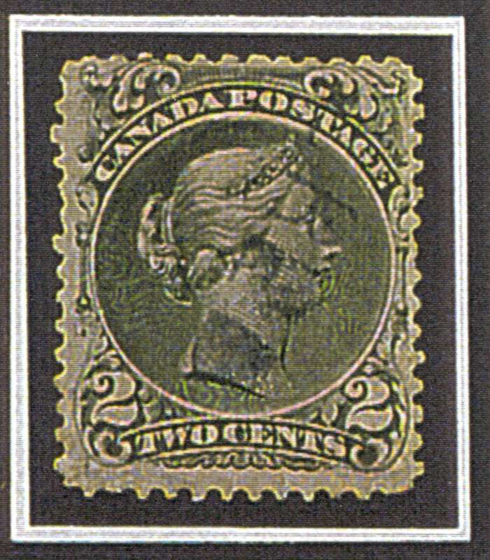 2c Large Queen on laid paper